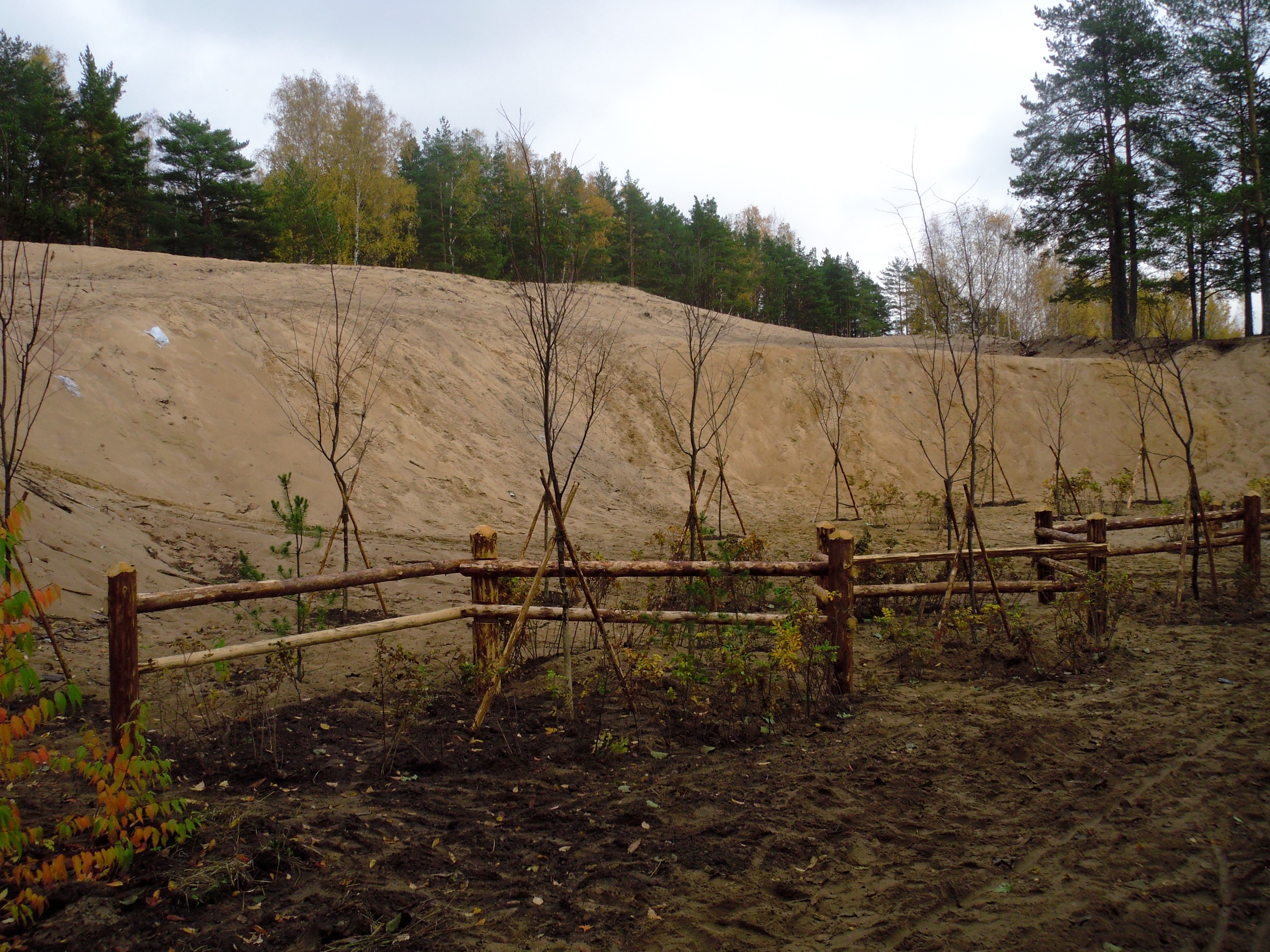 Сестрорецк СПб. Ржавая канава. Защита дюн от разработки песка дикими карьерами, путём посадки деревьев.